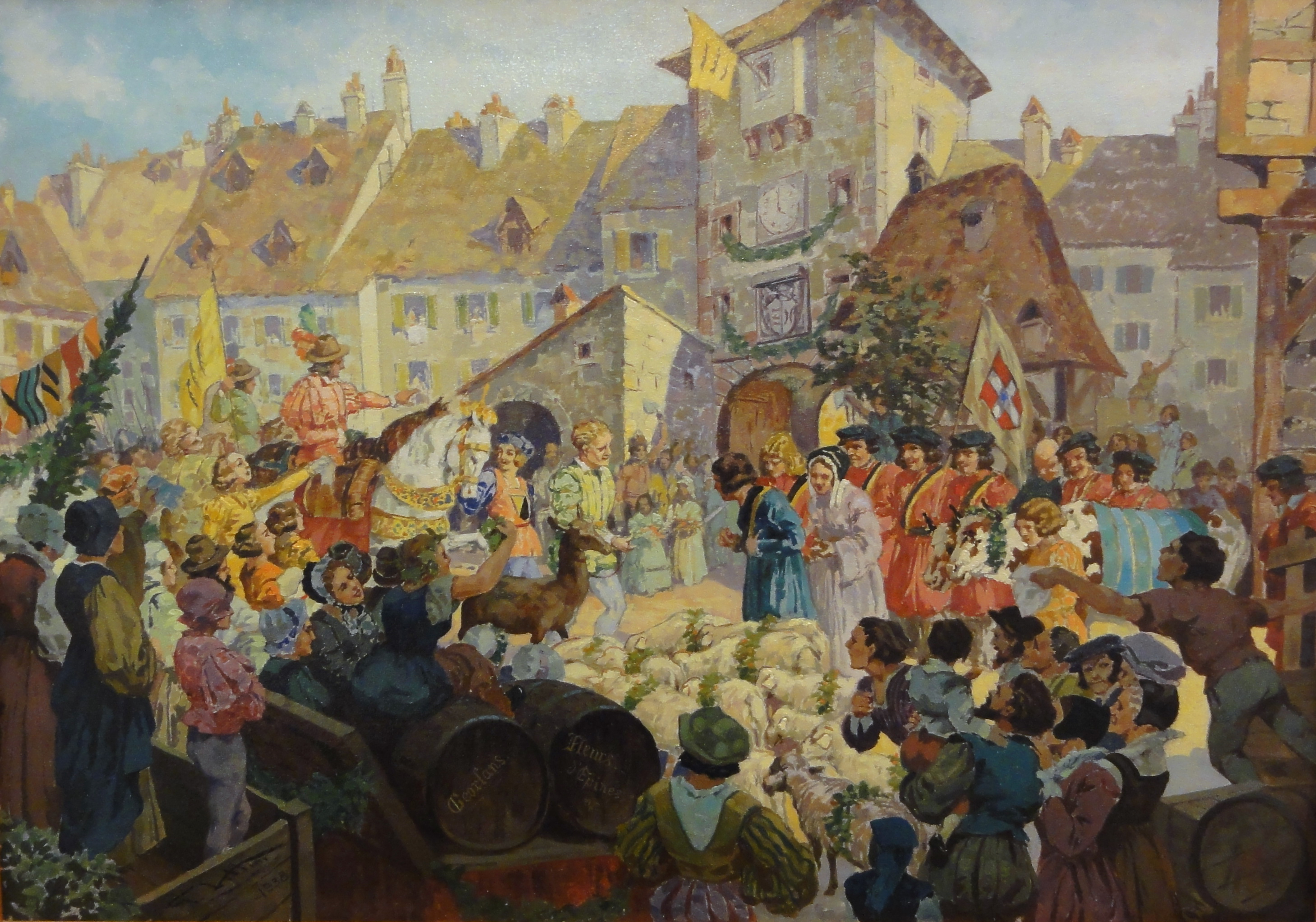 Прибытие Георга I в Монбельяр 14 сентября 1526 года. Въезд через ворота Ауле.